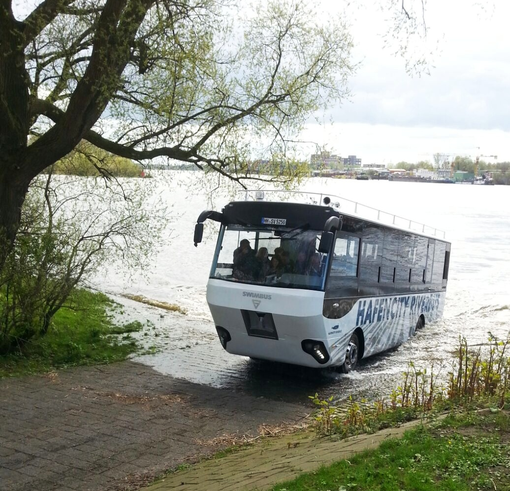 Der Riverbus von vorne